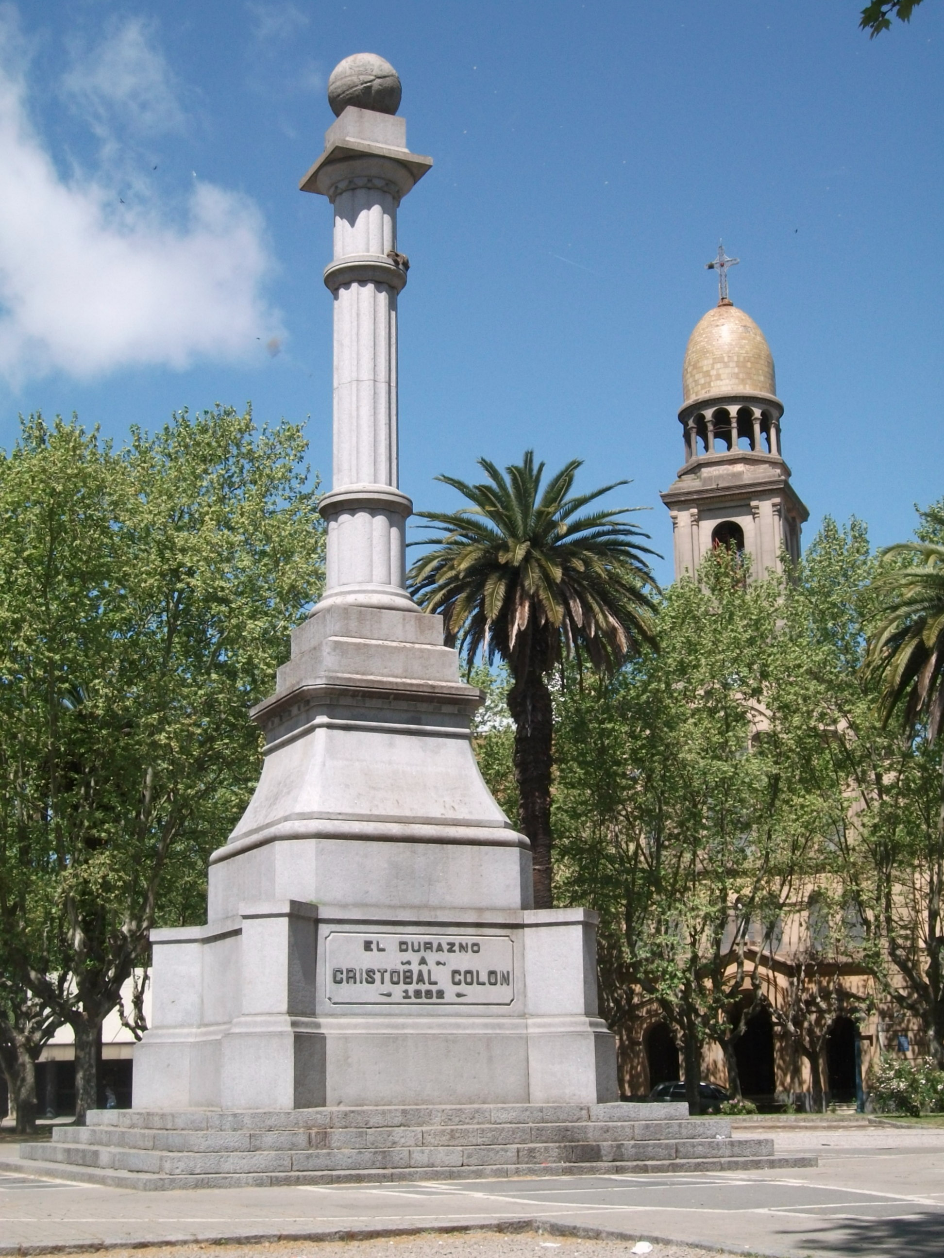 Monumento a Colón (Columna del cuarto centenario). Obra de inmigrantes y lugareños construida con aporte popular en 1892-93, su autor fue el escultor italiano Juan Azzarini, se inauguró el 25 de agosto de 1893. Es de granito gris de la zona y la columna está coronada por una esfera que contiene una caja de plomo con documentos de la época y que fueran retirados al ser abierta en 1992 al cumplir 100 años. Ahora conserva documentos de 1992 para ser conocidos en 2092. Ubicada en el departamento de Durazno